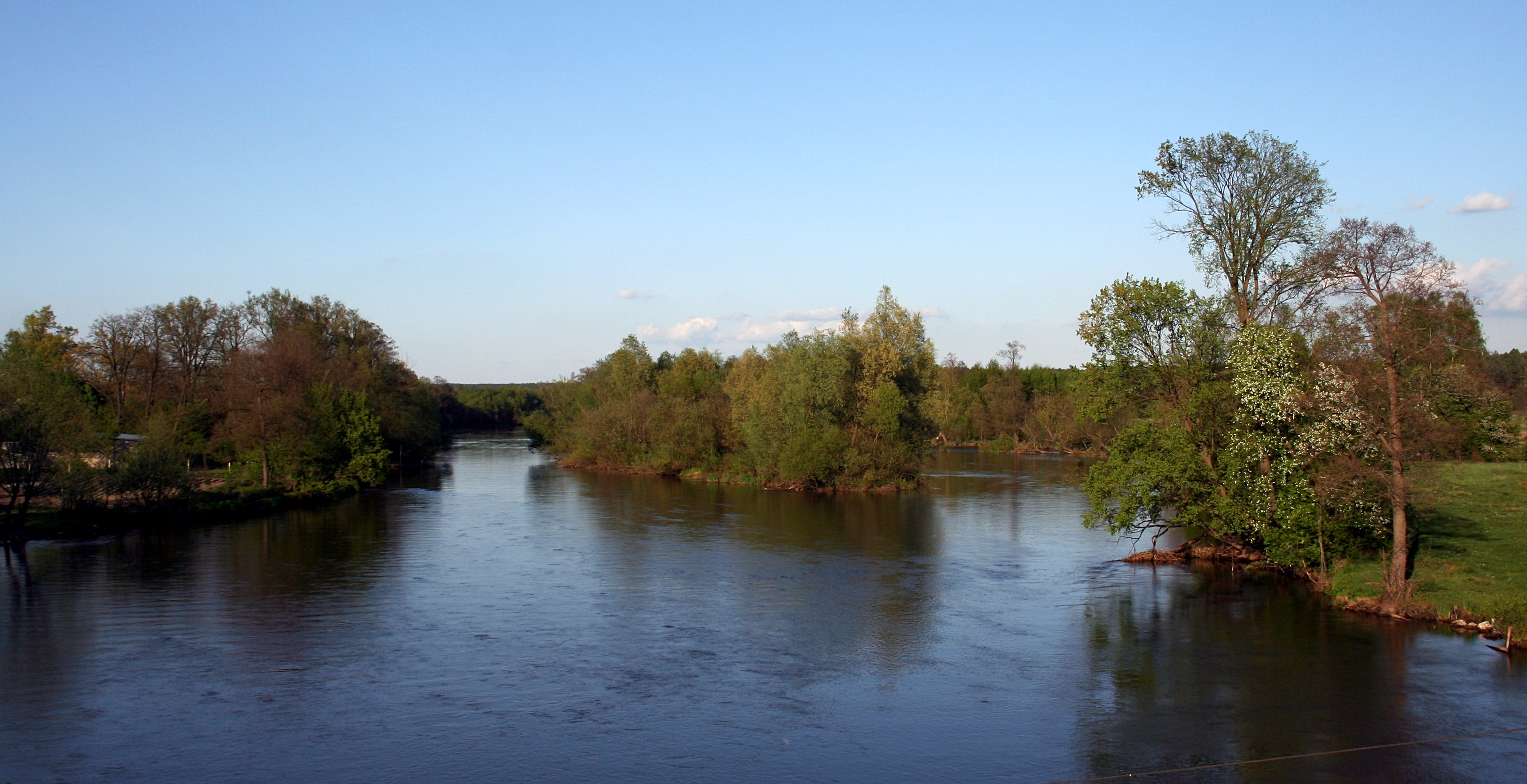 Bobrowniki, gmina Dzisłoszyn - widok na Wartę